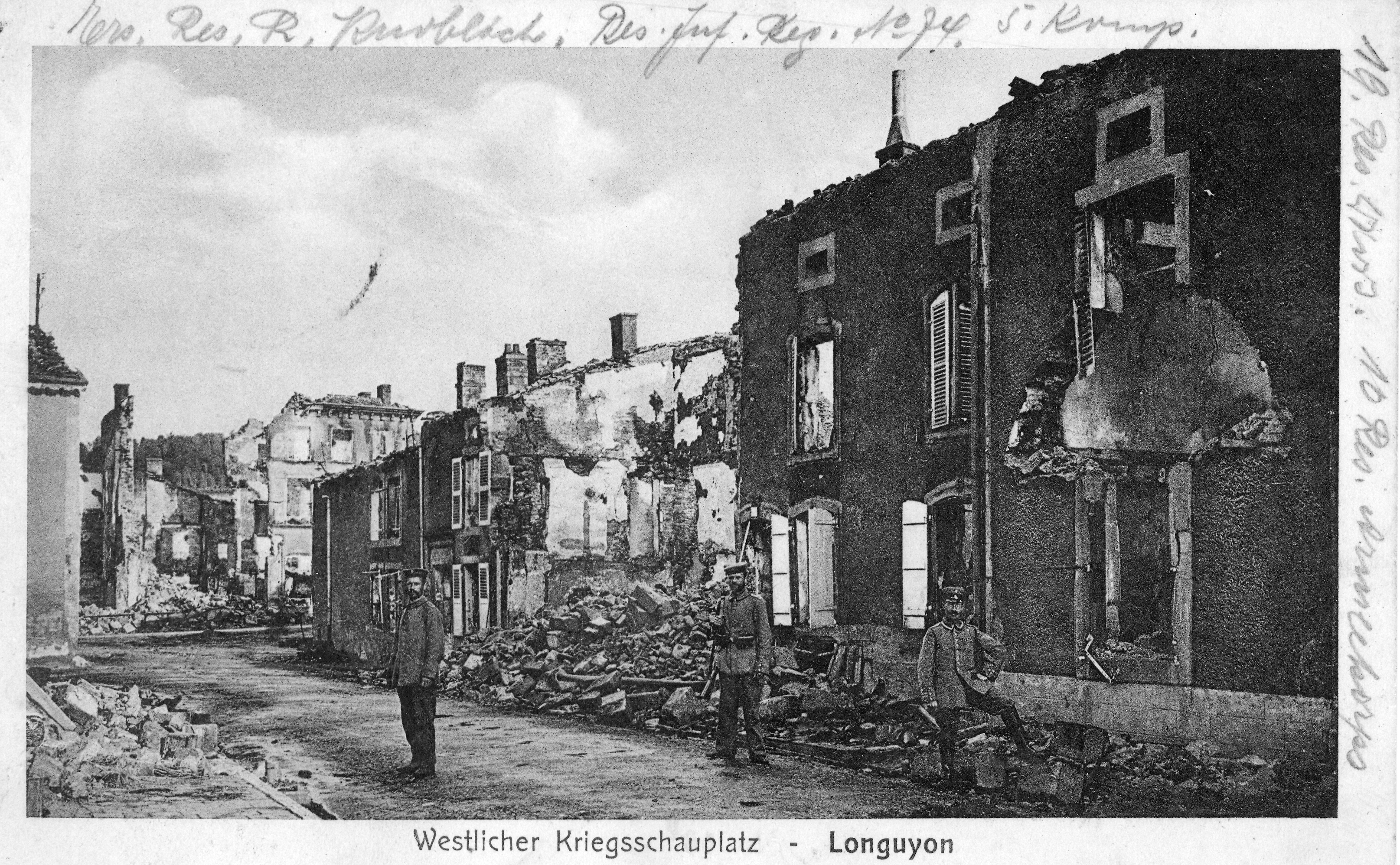 Schwarzweiße Feldpostkarte aus dem 1. Weltkrieg ca. 1914: "Westlicher Kriegsschauplatz - Longuyon"